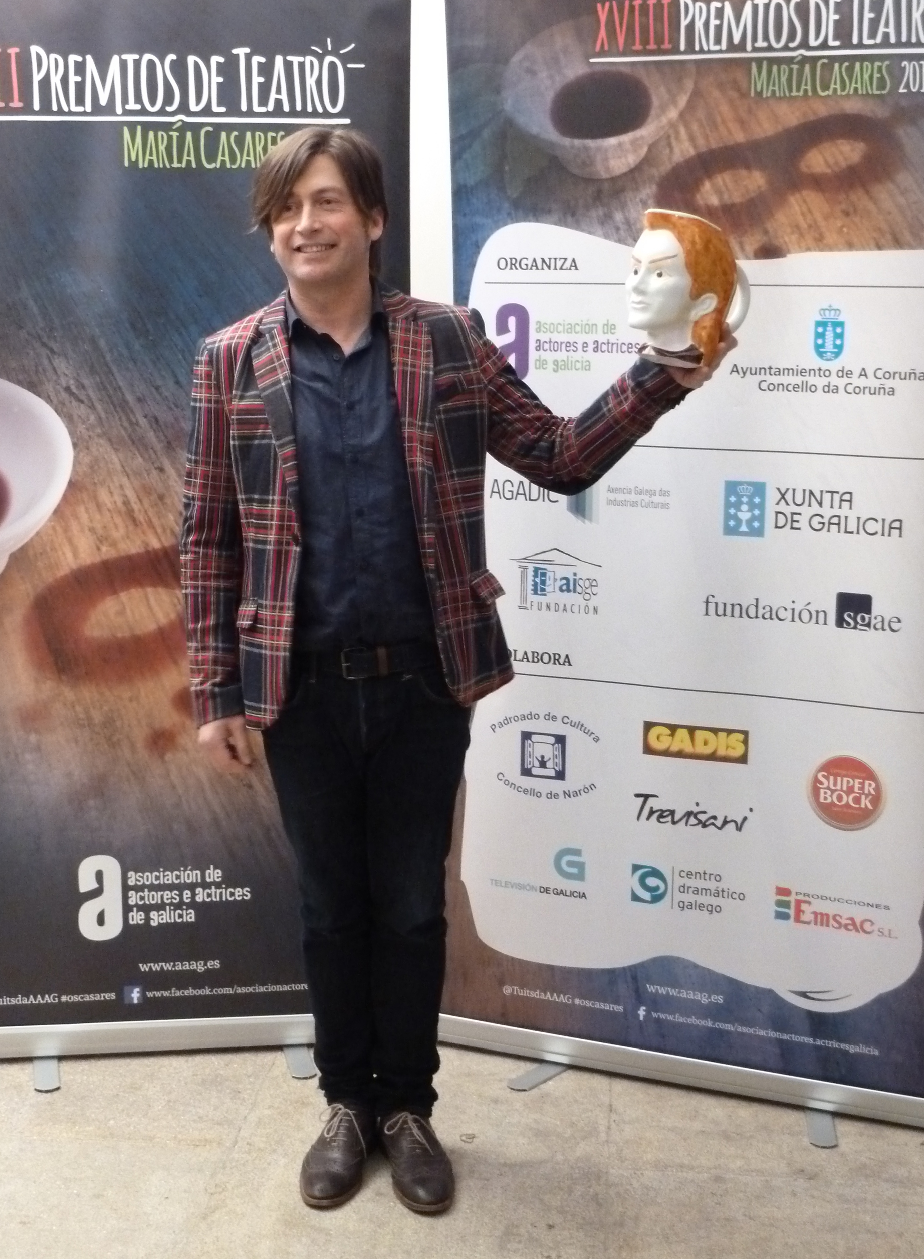 Carlos Mosquera “Mos” na gala dos premios María Casares 2014.